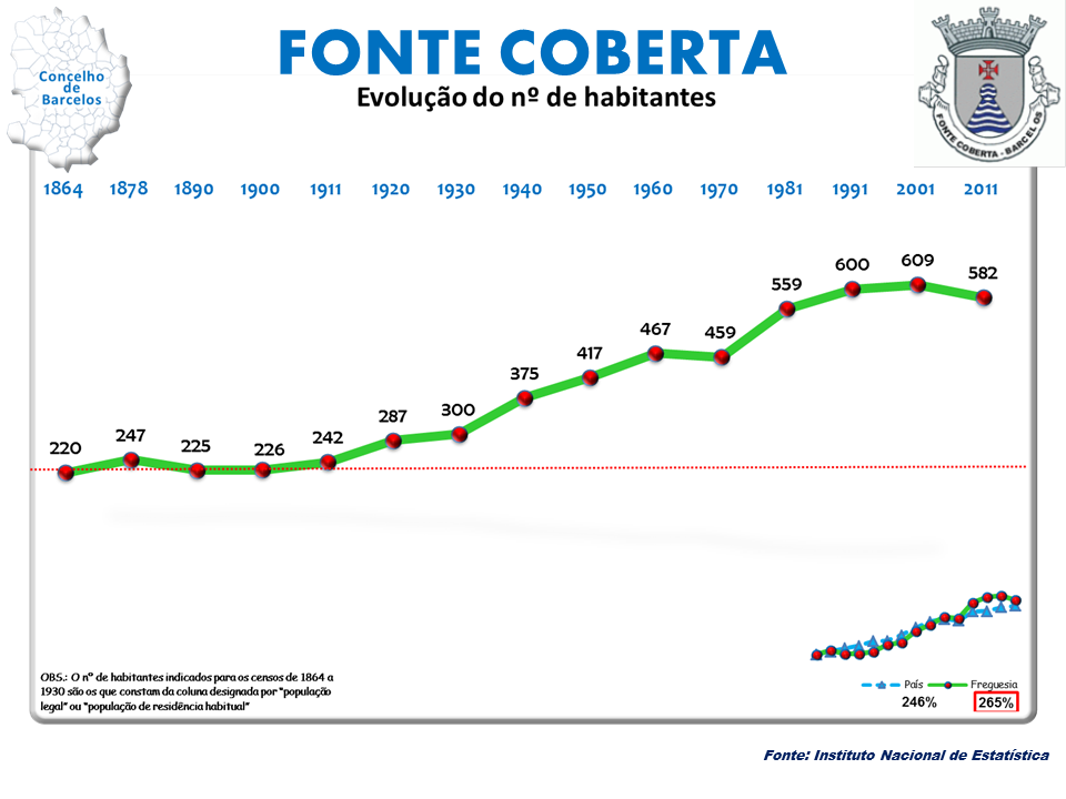 anos1864/2011